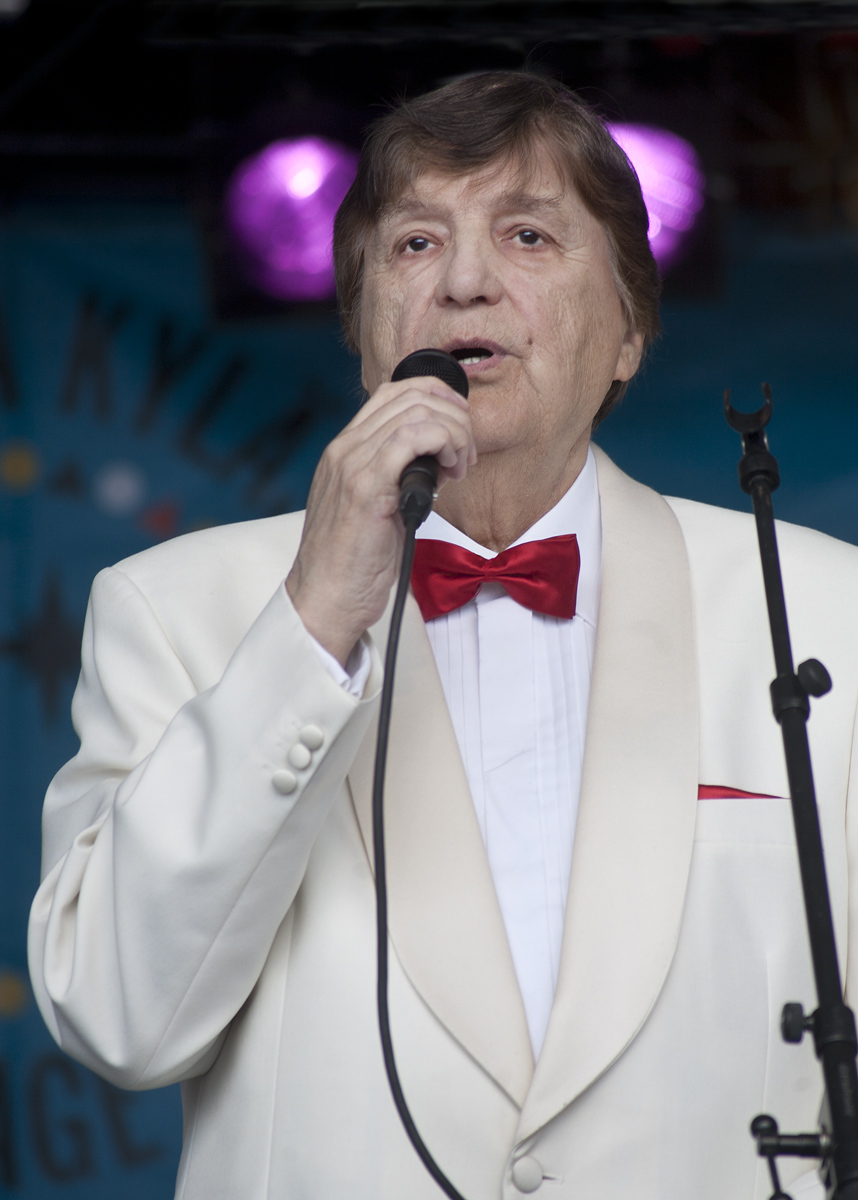 Laulaja Kai Lind esiintymässä lauluyhtye Four Catsin kanssa Helsingin Kaisaniemessä Maailma kylässä -festivaalilla 25.5.2014